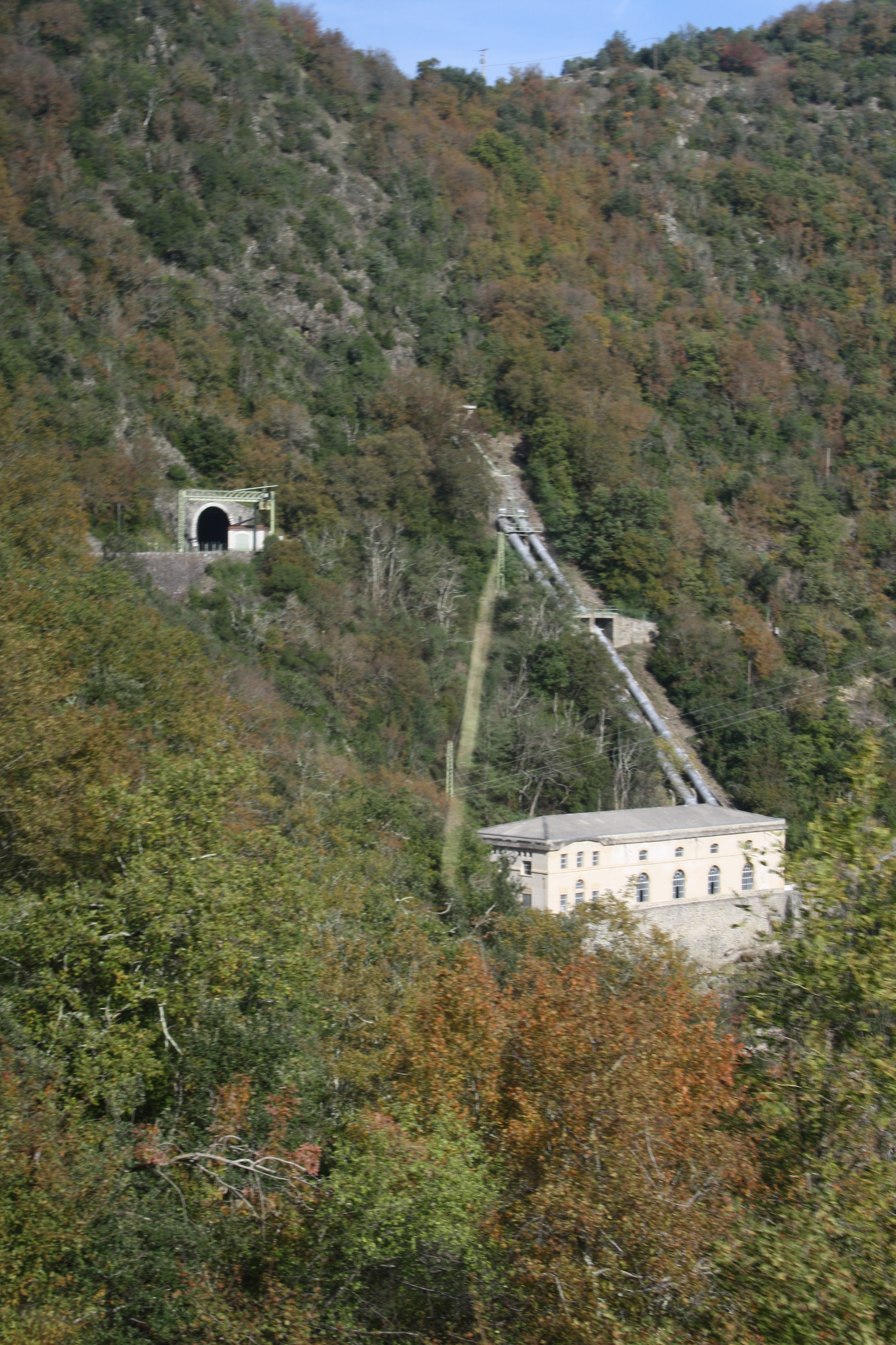 Kraftwerk und Eisenbahntunnel Mordane im Tal des Doux